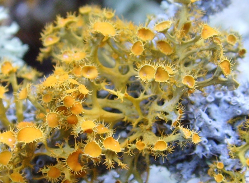 Teloschistes chrysophthalmus sur une branche d'orme (Penn ar Run, Goulien, Finistère, France)